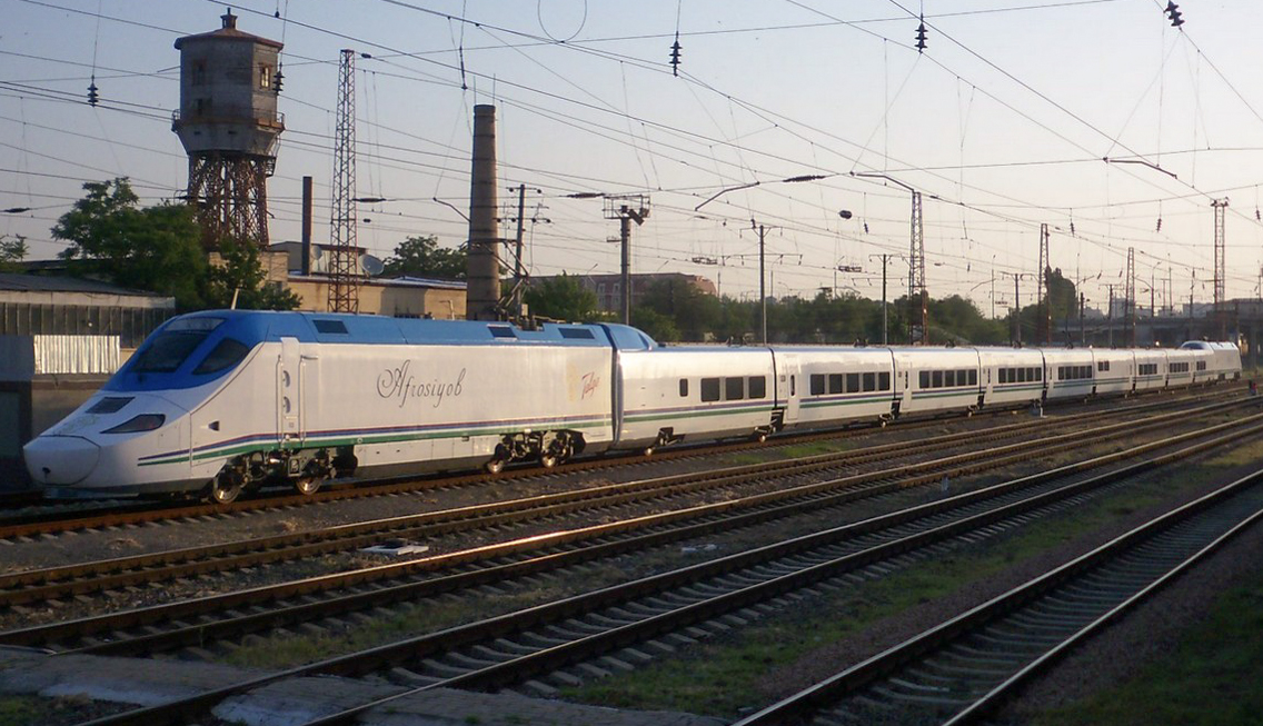 Скоростной электропоезд Talgo 250 Afrosiyob в Ташкенте